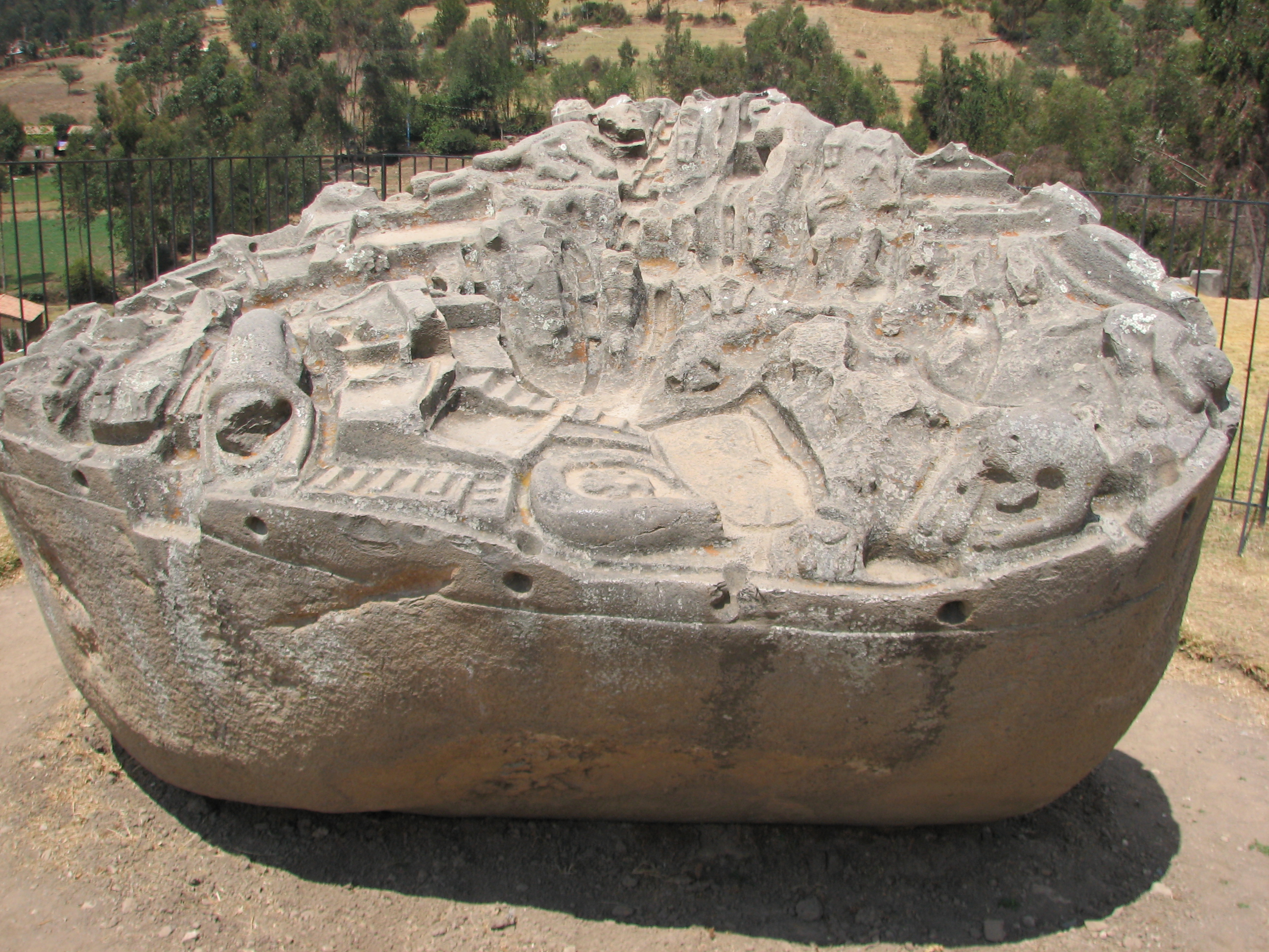 Sayhuite Archaeological site (rock sculpture)